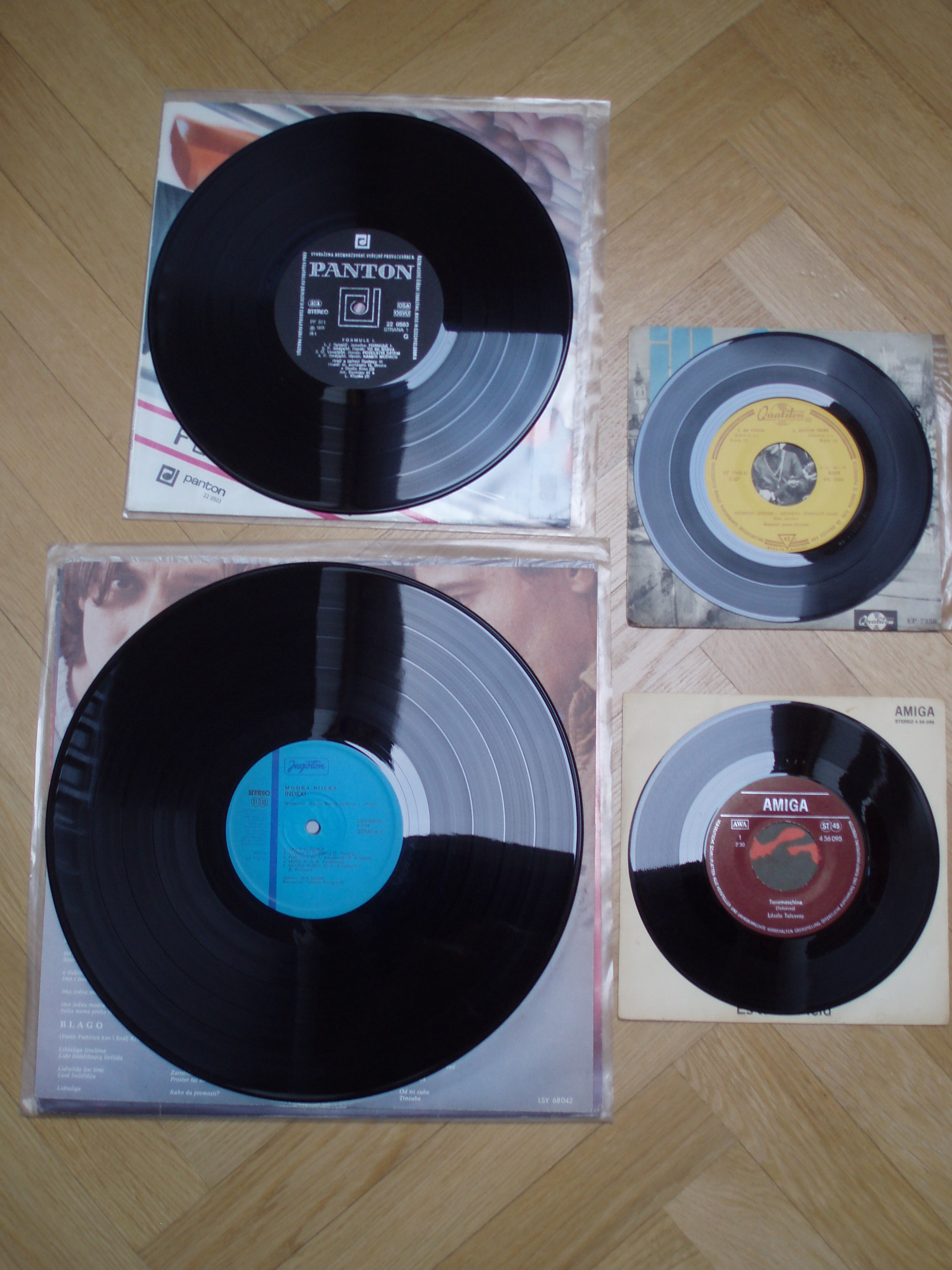 Különböző fajtájú mikrobarázdás hanglemezek